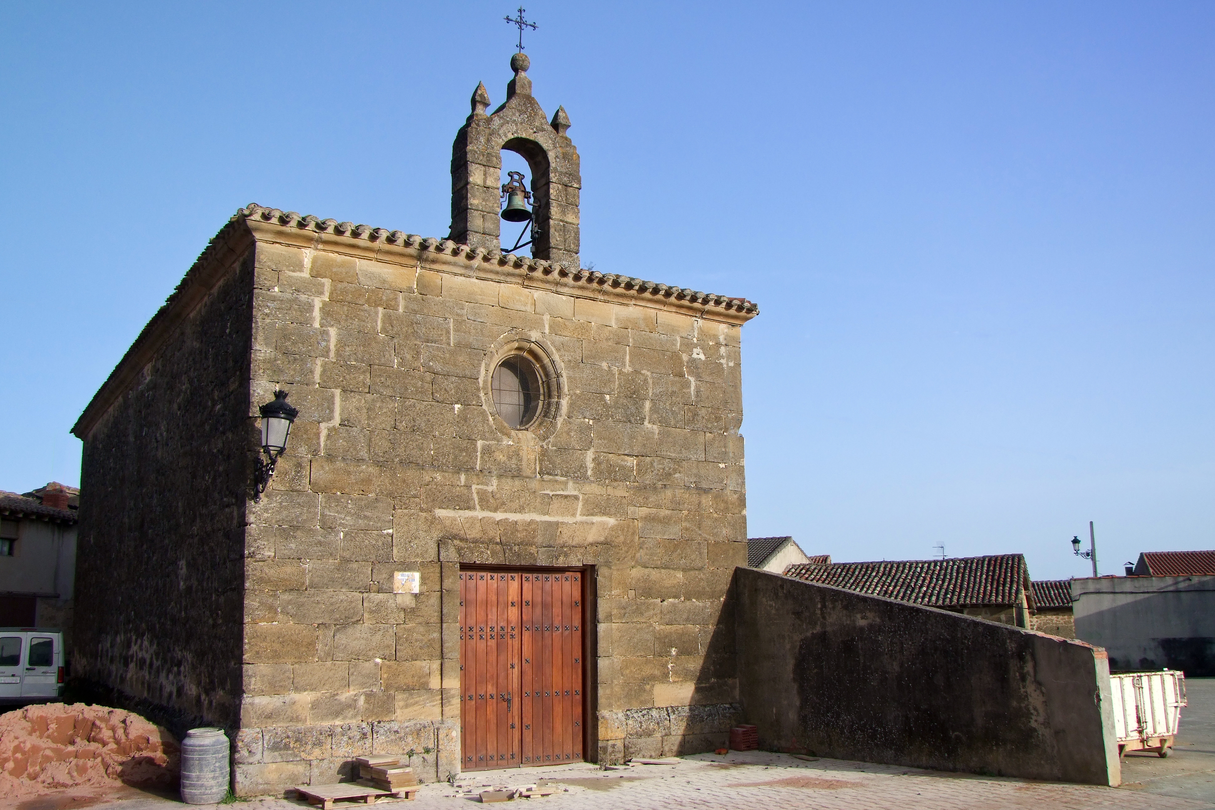 Ermita de la Virgen de los Remedios en la localidad de Villalba de Rioja, La Rioja - España